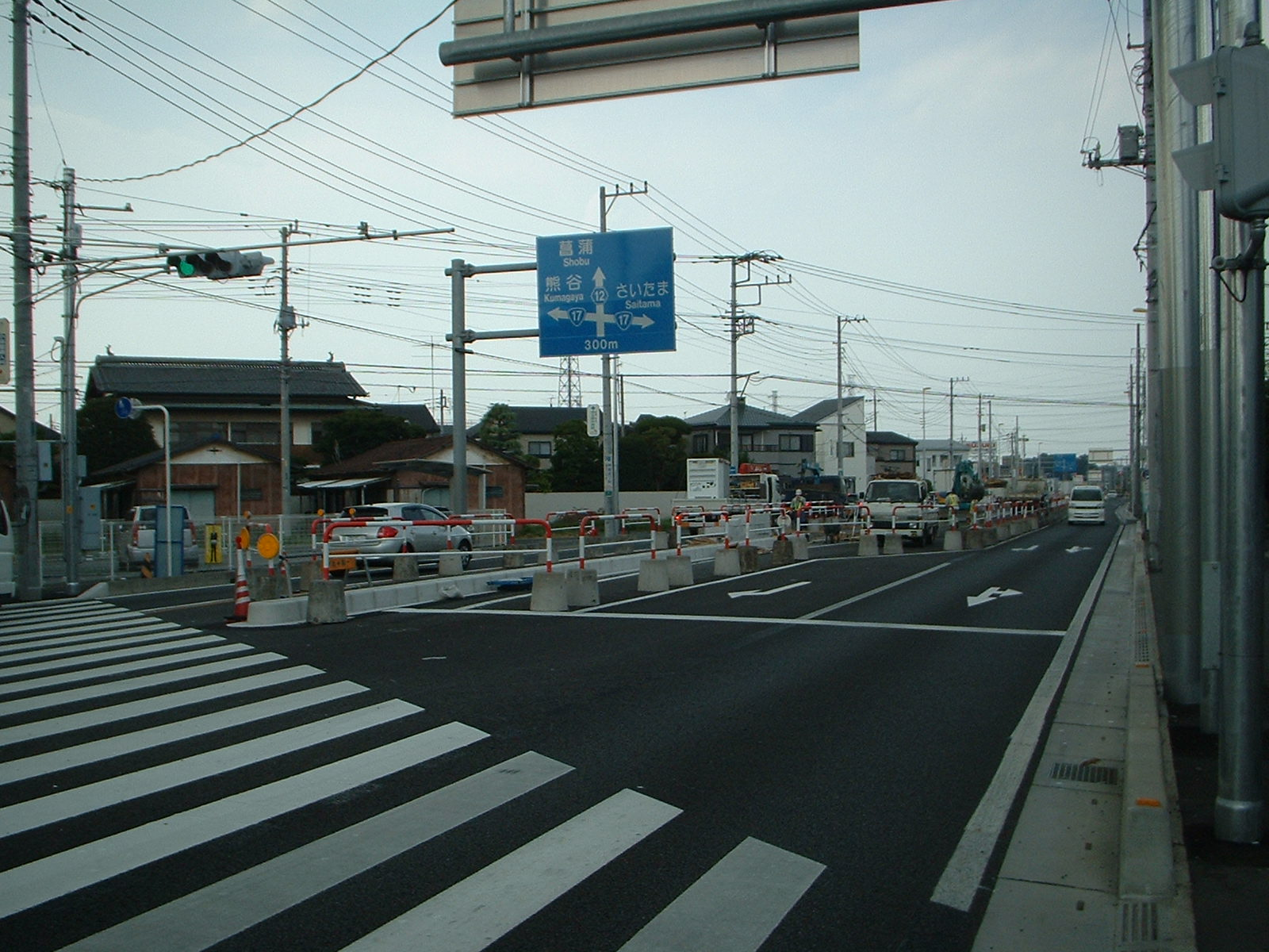 桶川市内で行われている県道12号の拡張工事の様子。前日までは歩道の工事をしていたが、撮影した日から中央分離帯の設置が再開された。